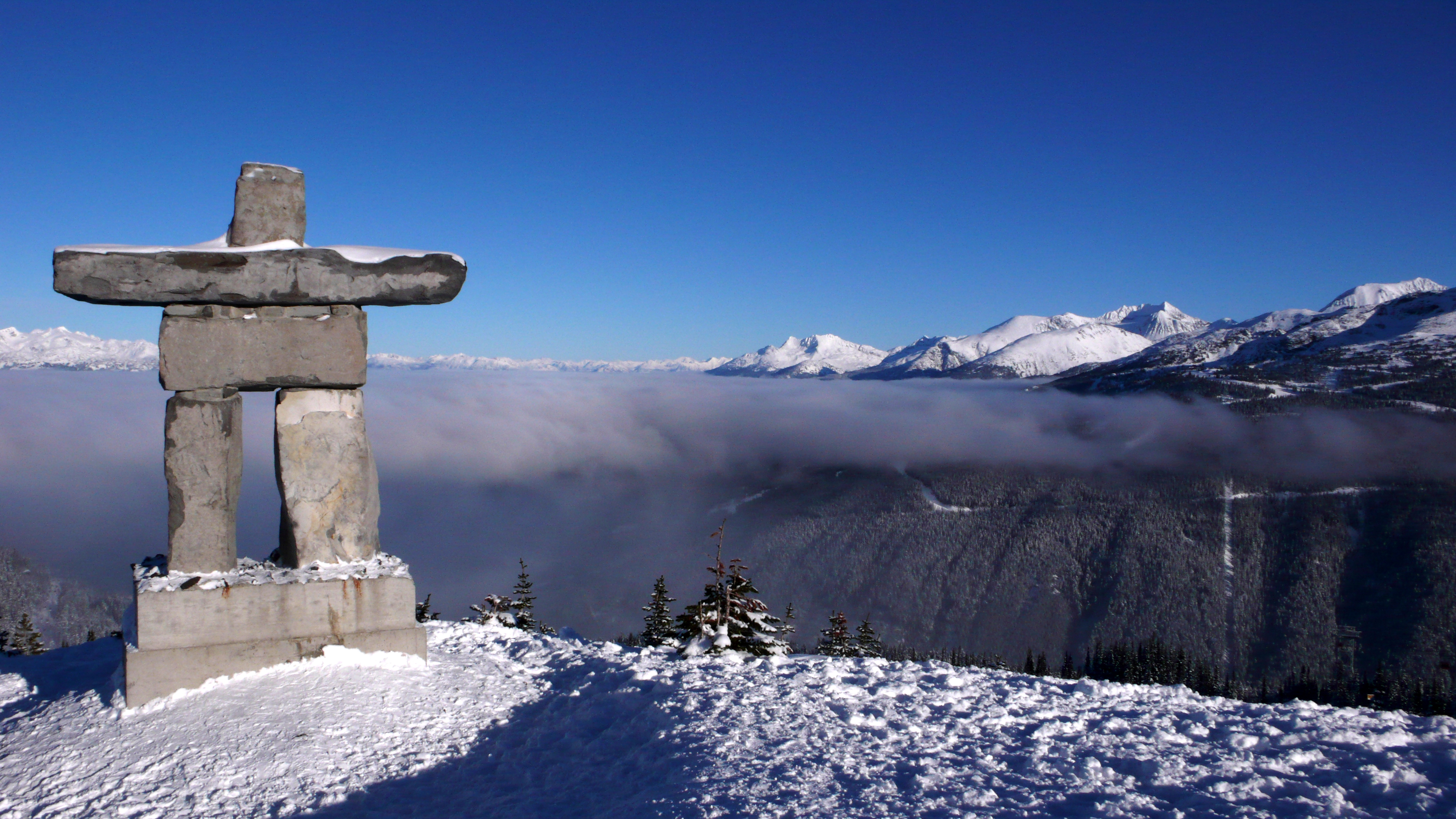 Whistler Peak's Inukshuk